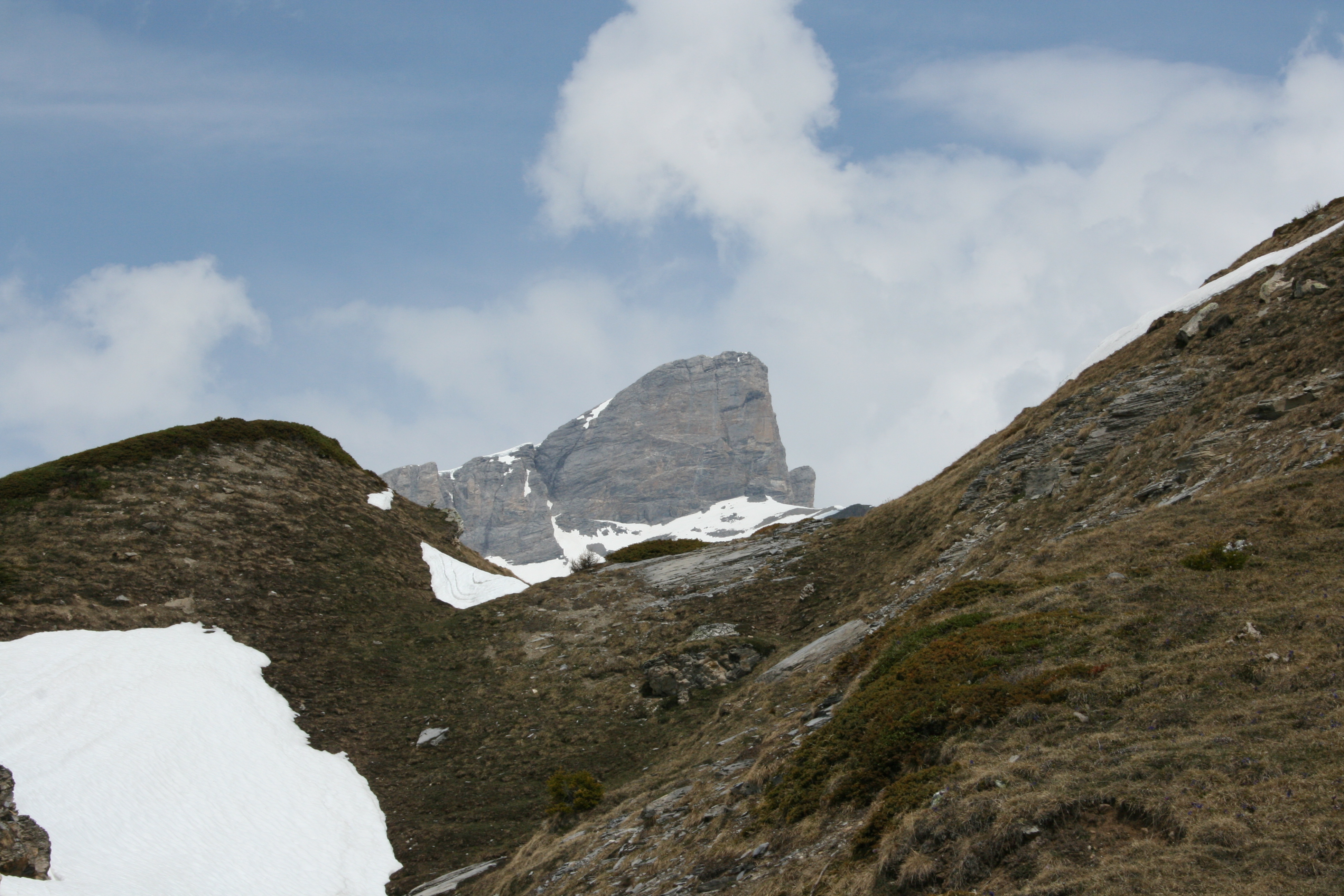 Trubelstock from Varneralp (above Salgesch)